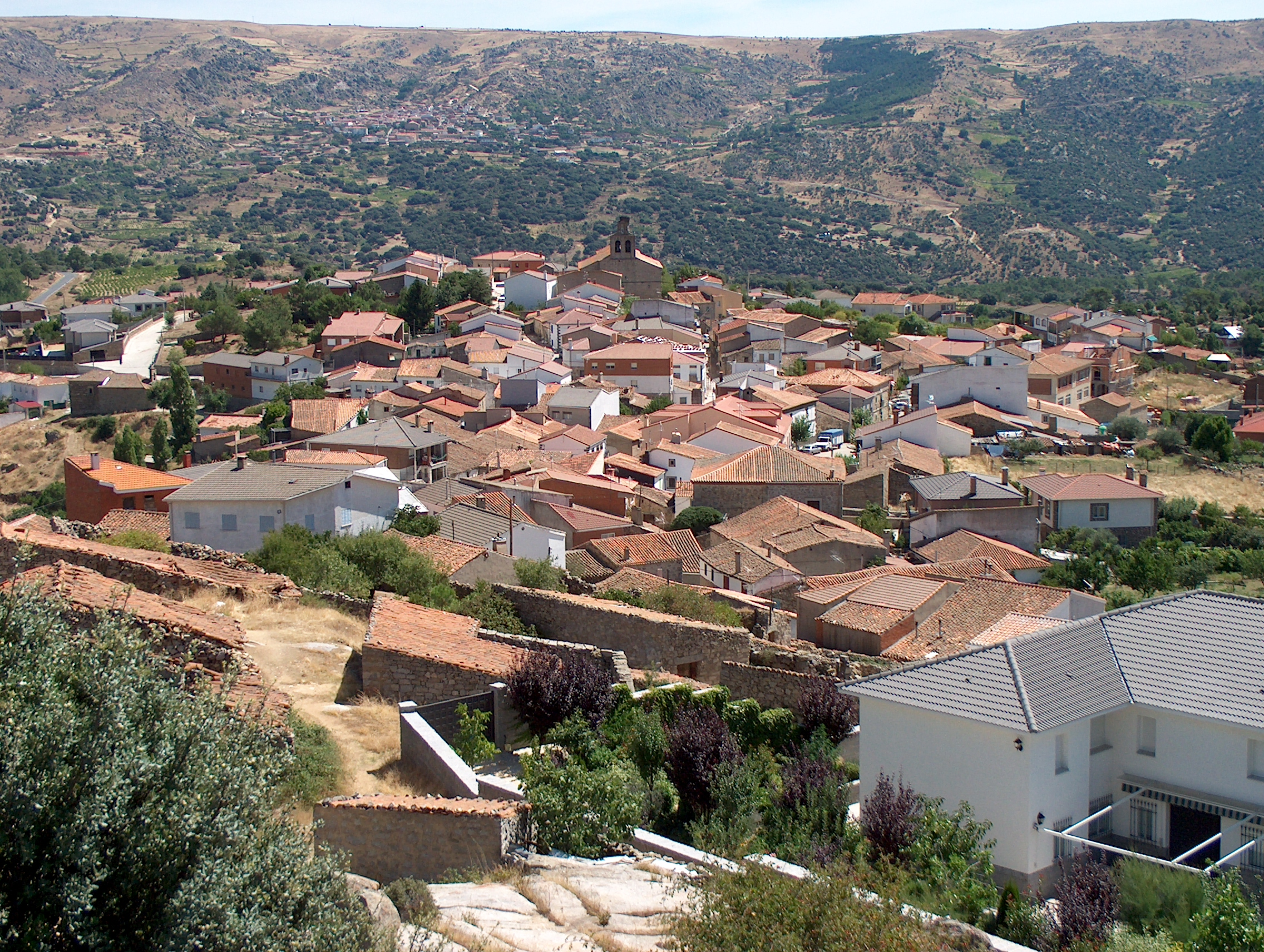 Santa Cruz de Pinares, un pueblo de la provincia de Ávila (Castilla y León), en España. Imagen tomada desde "la Sierra".